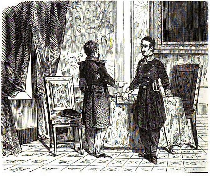 disegno Francesco II chiede consiglio all'ambasciatore francese Brenier